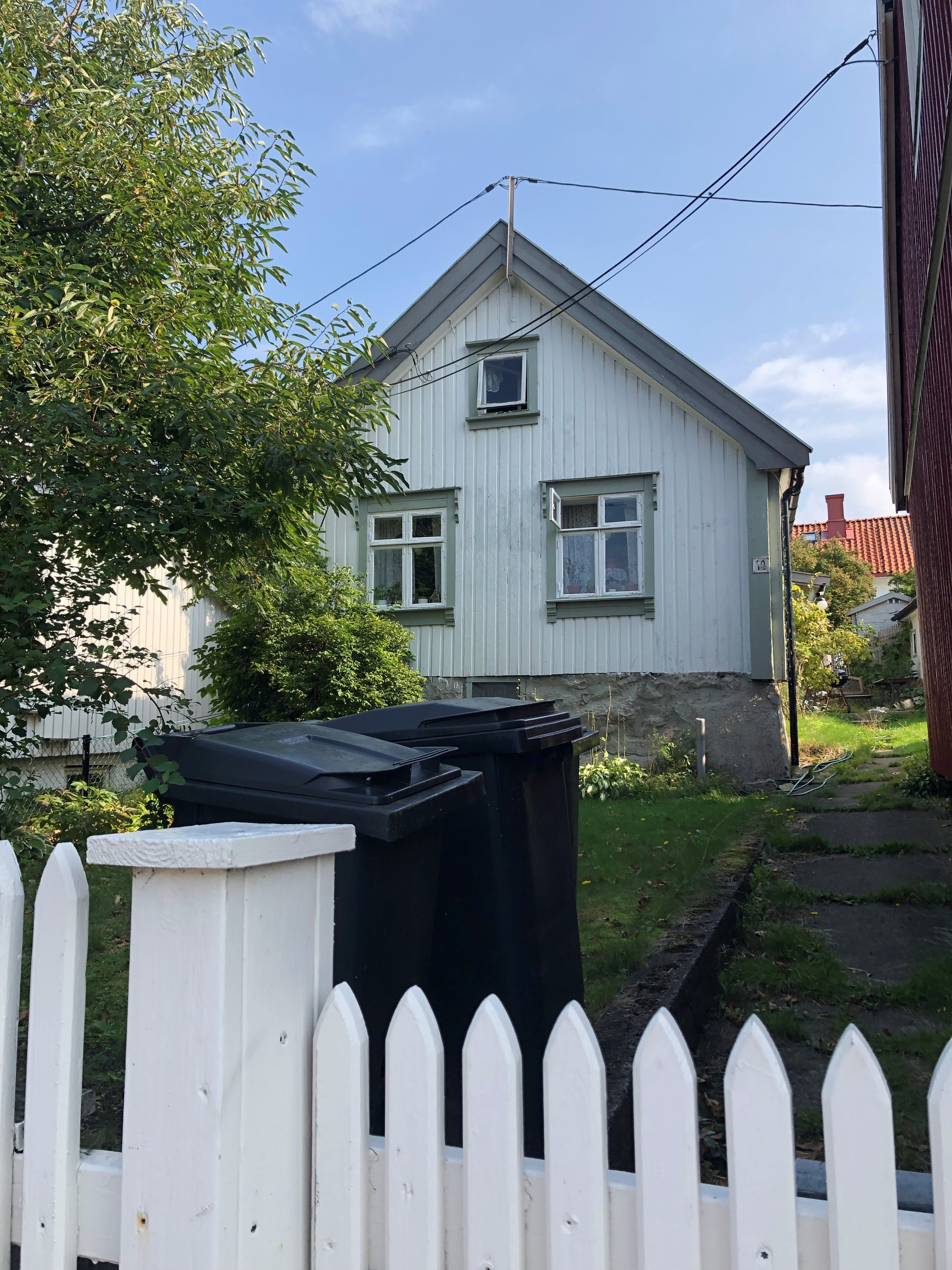 Bildet er fra 2019. Foto: Privat